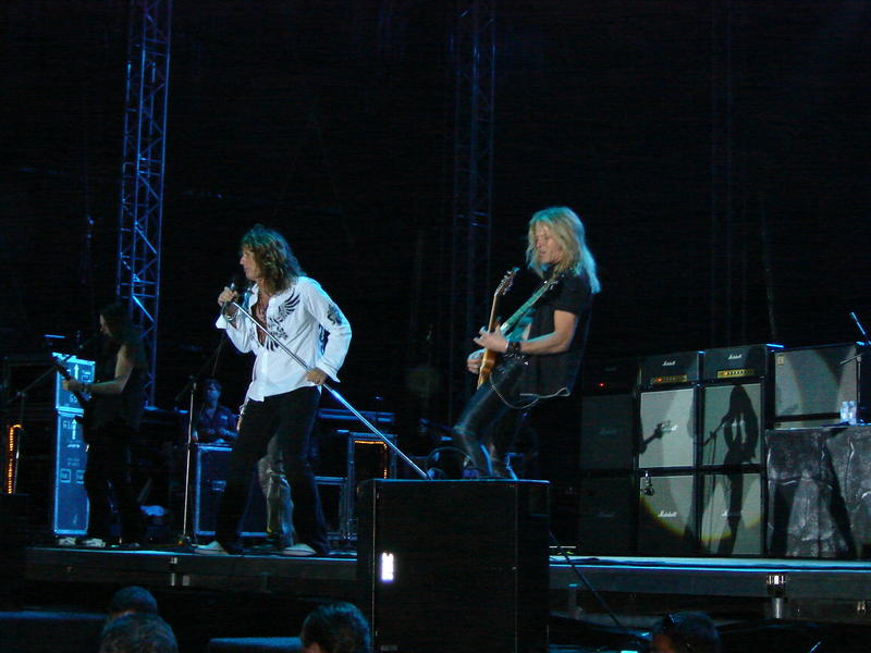 Концерт на Уайтснейк в София